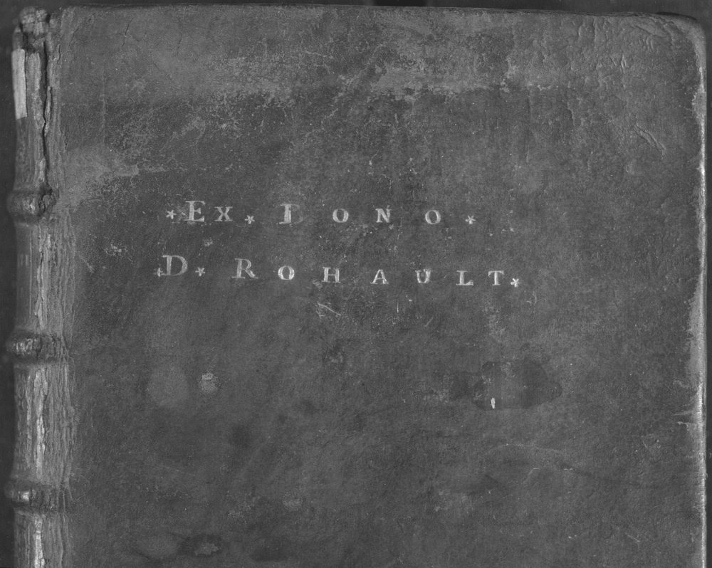 Ex-dono estampé à chaud dans la reliure d'une Physica - coll. Bibliothèque interuniversitaire de Santé.